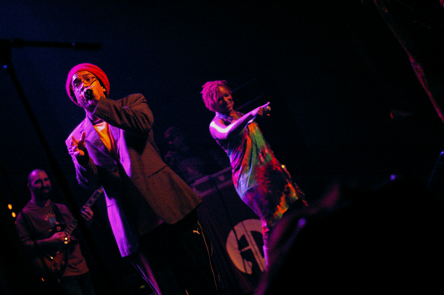 Arrested Development en concert au Het Depot